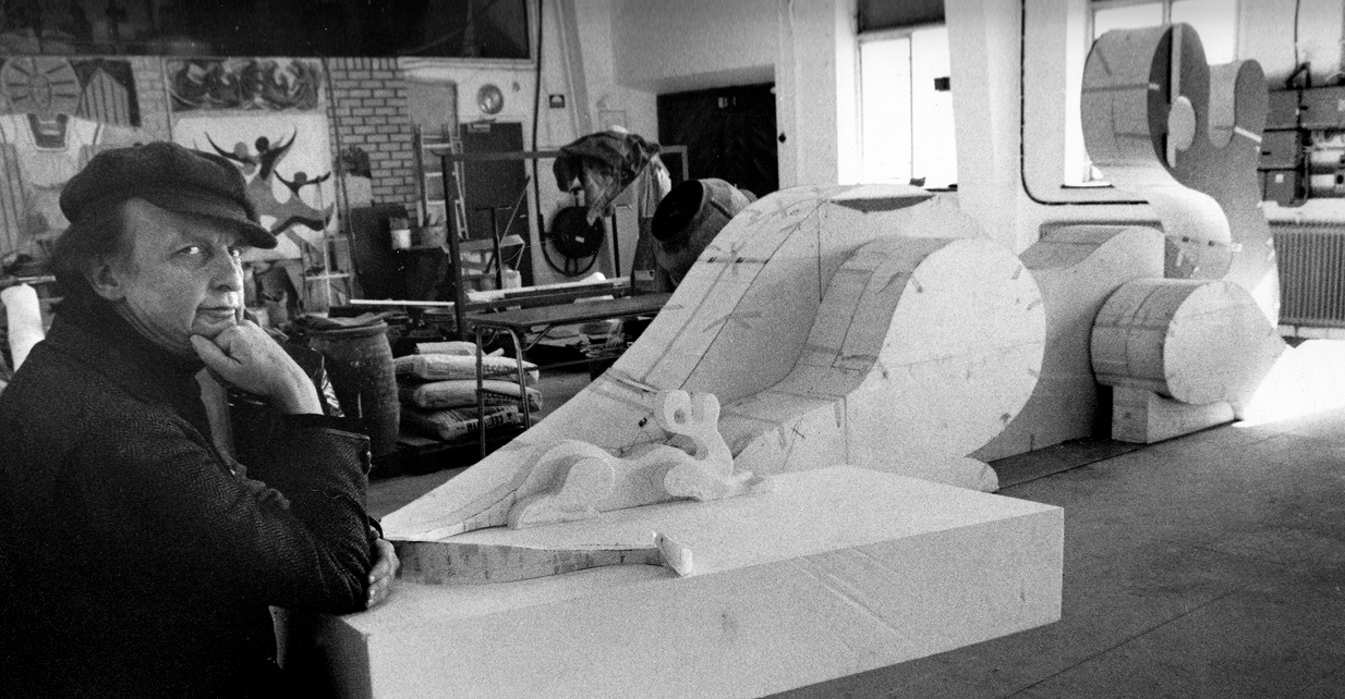 Gunnar Frieberg i ateljén med modell till Augusta, i fonden grundstommen i full skala. 1991.